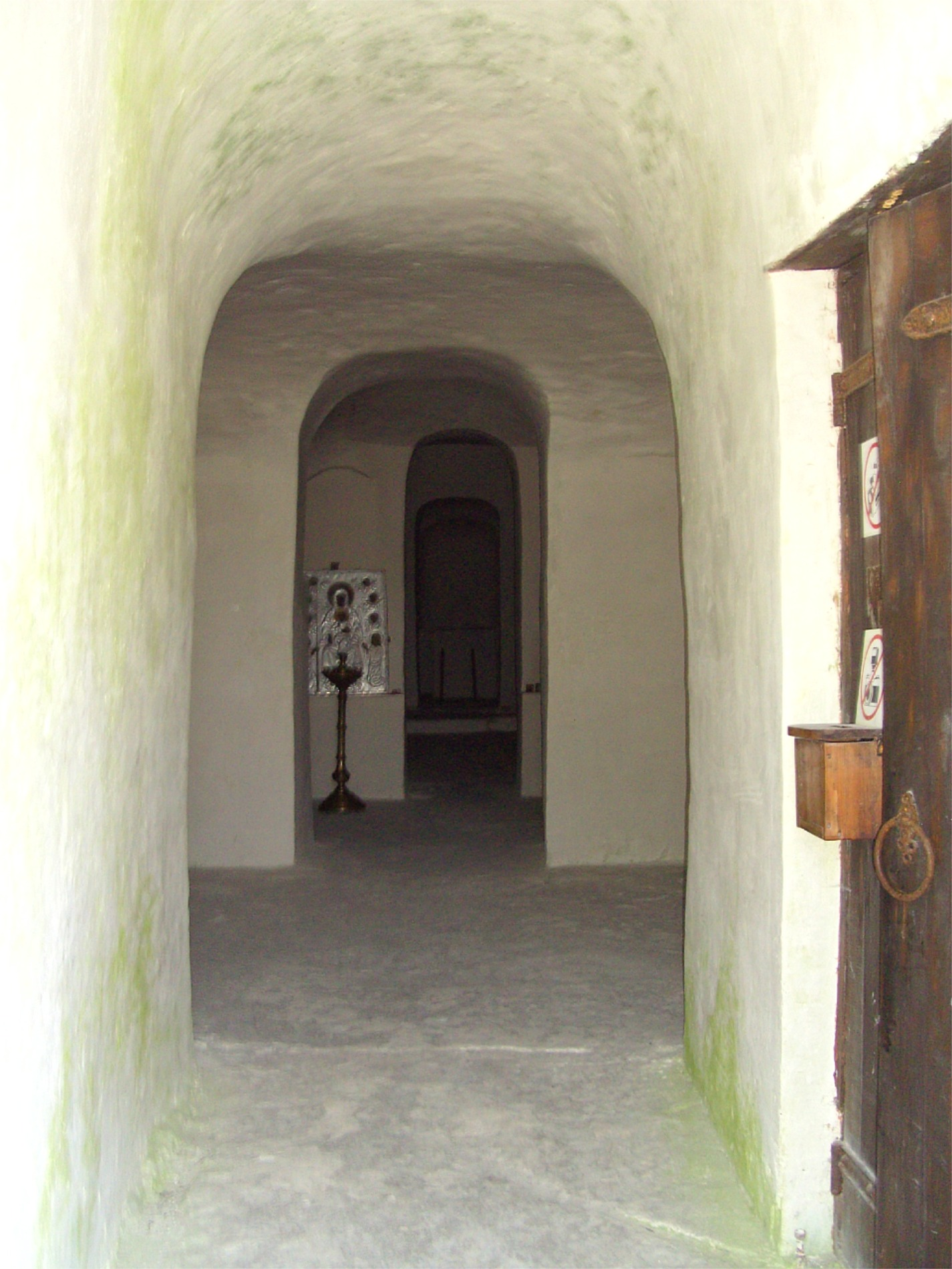 Kirche der sizilianischen Gottesmutter im Kreidefels im Naturschutzgebiet Diwnogorje.